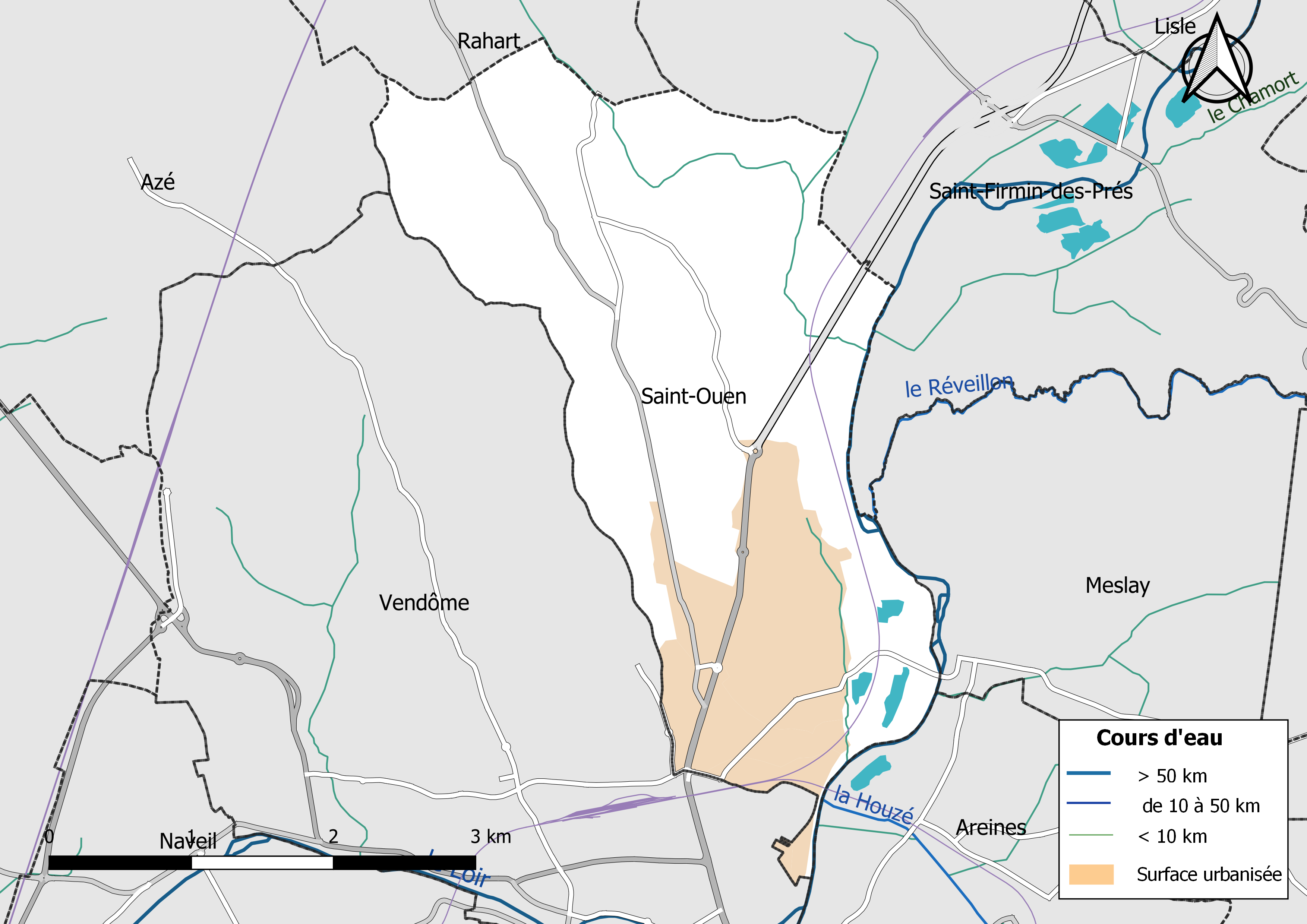 Carte du réseau hydrographique de la commune de Saint-Ouen (Loir-et-Cher) (France).